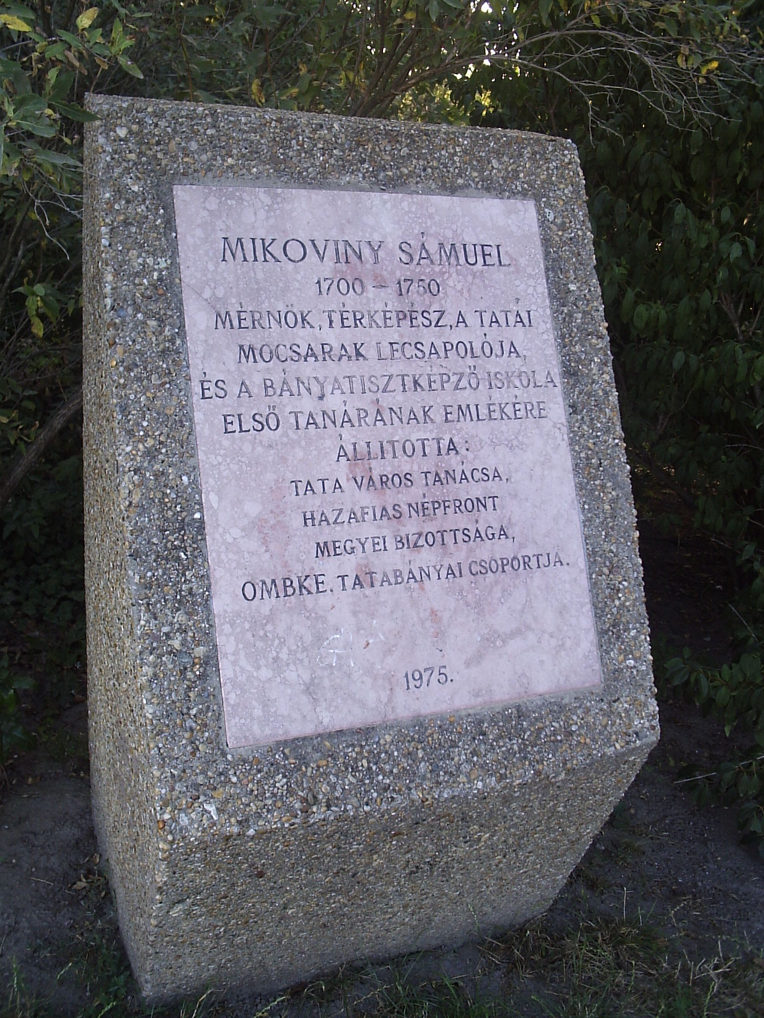 Mikoviny_Sámuel_memorial tablet_Tata Photo: József Süveg (2005)